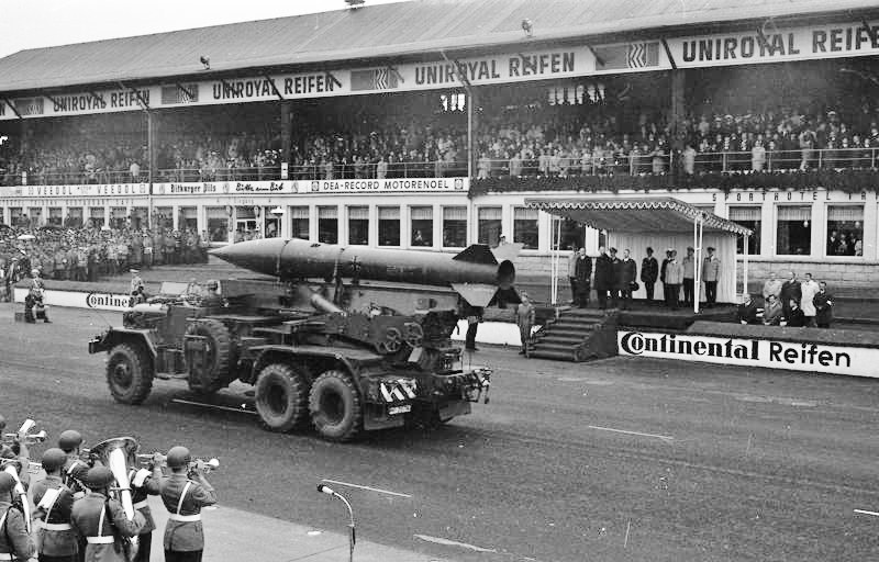 20 Jahre NATO. Bundeswehrparade auf dem Nürburgring.